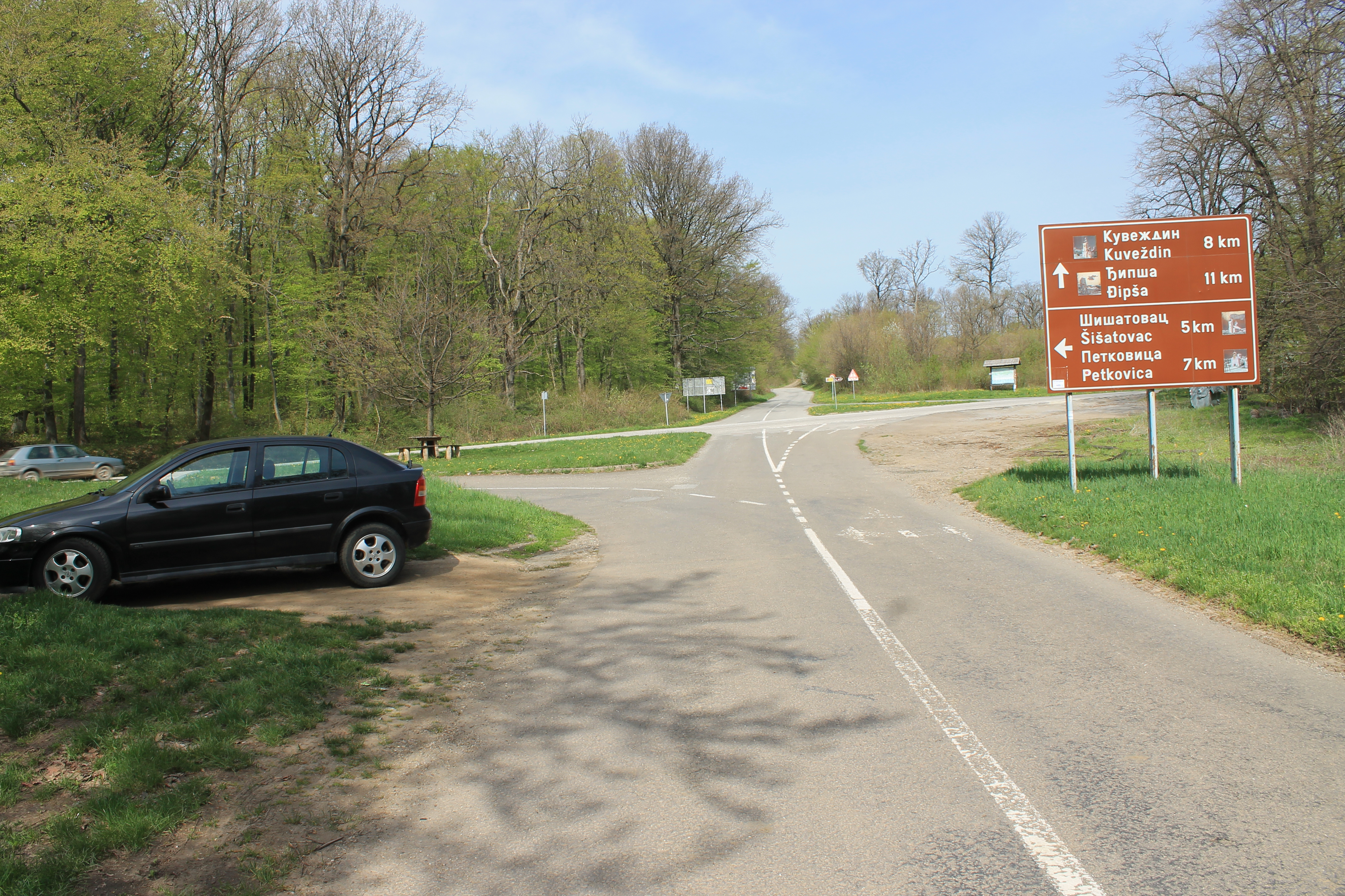 Partizanski put